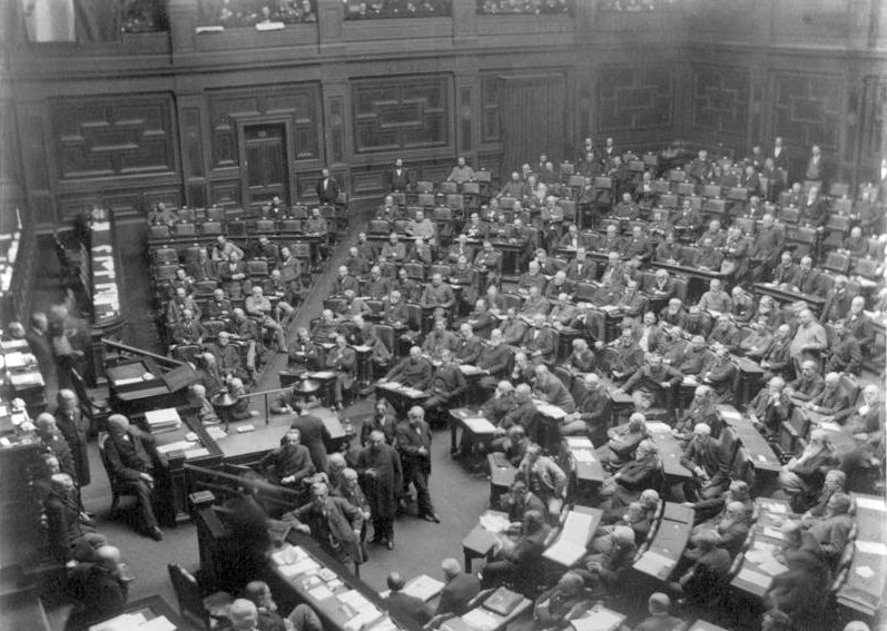 Reichstag, Plenarsitzungssaal 145. Plenarsitzungssaal - linke Seite.